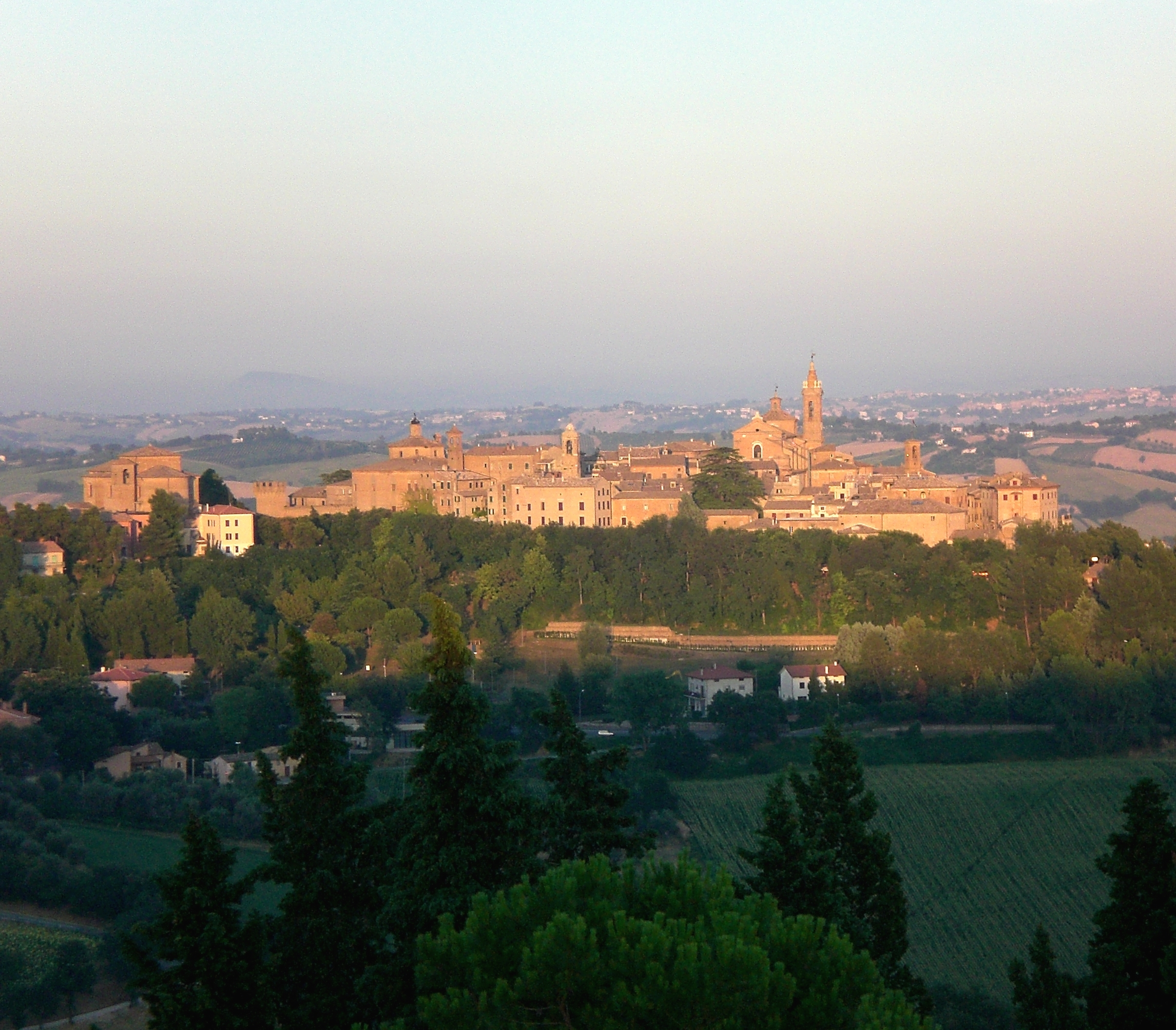 Panorama di Corinaldo